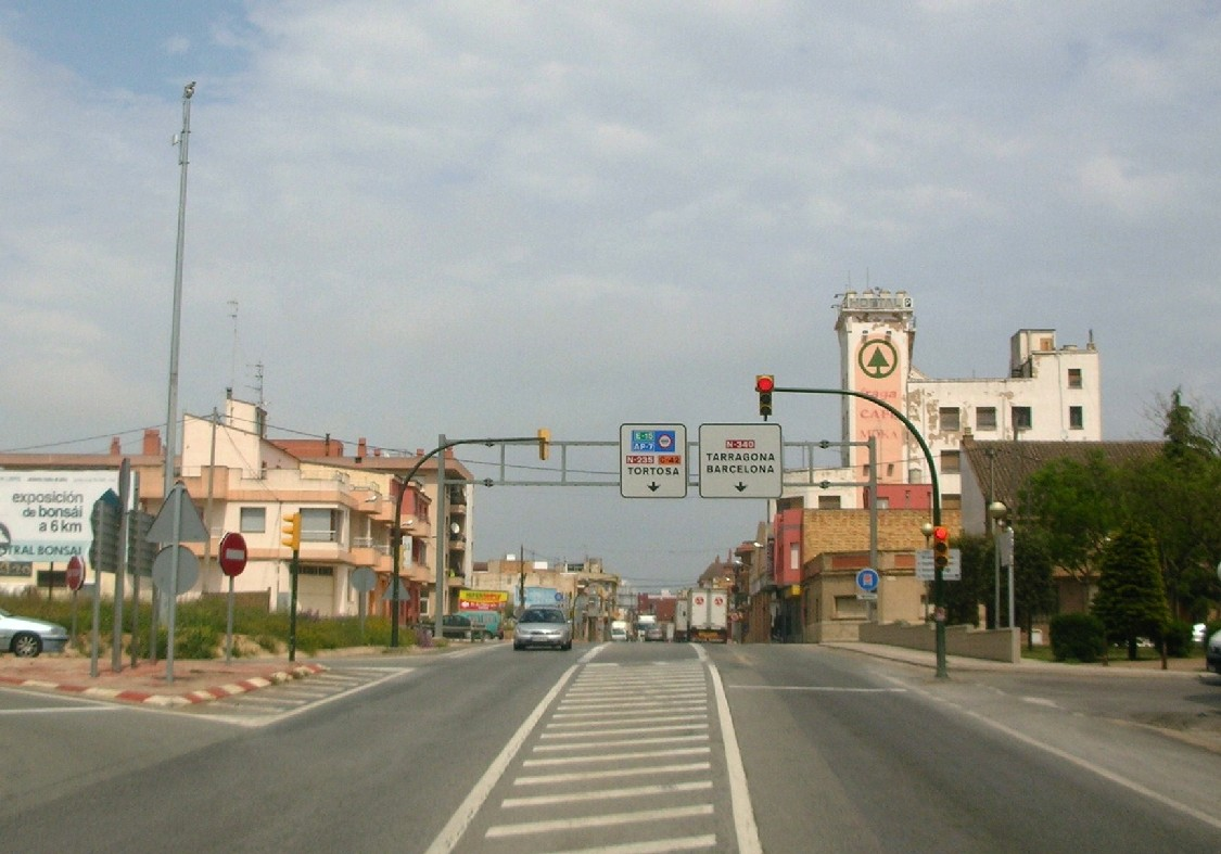 L'Aldea, Baix Ebre; main street